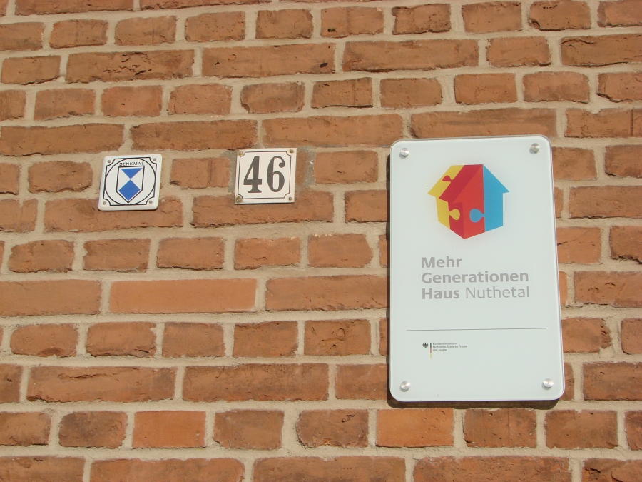 Baudenkmal; Hausnummer, Denkmalzeichen und Mehrgenerationenhaustafel an der sanierten Fassade